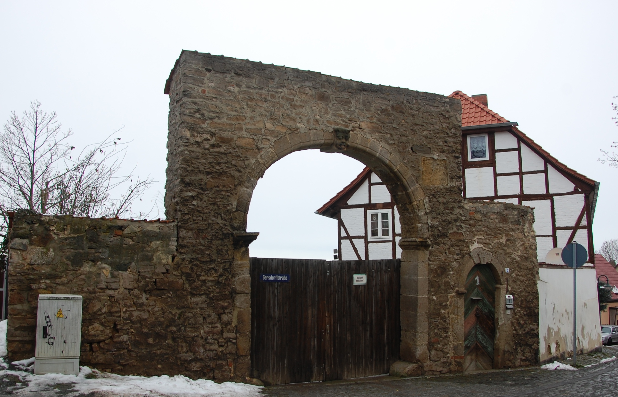 Haus Gersdorferstraße 1 in Gernrode